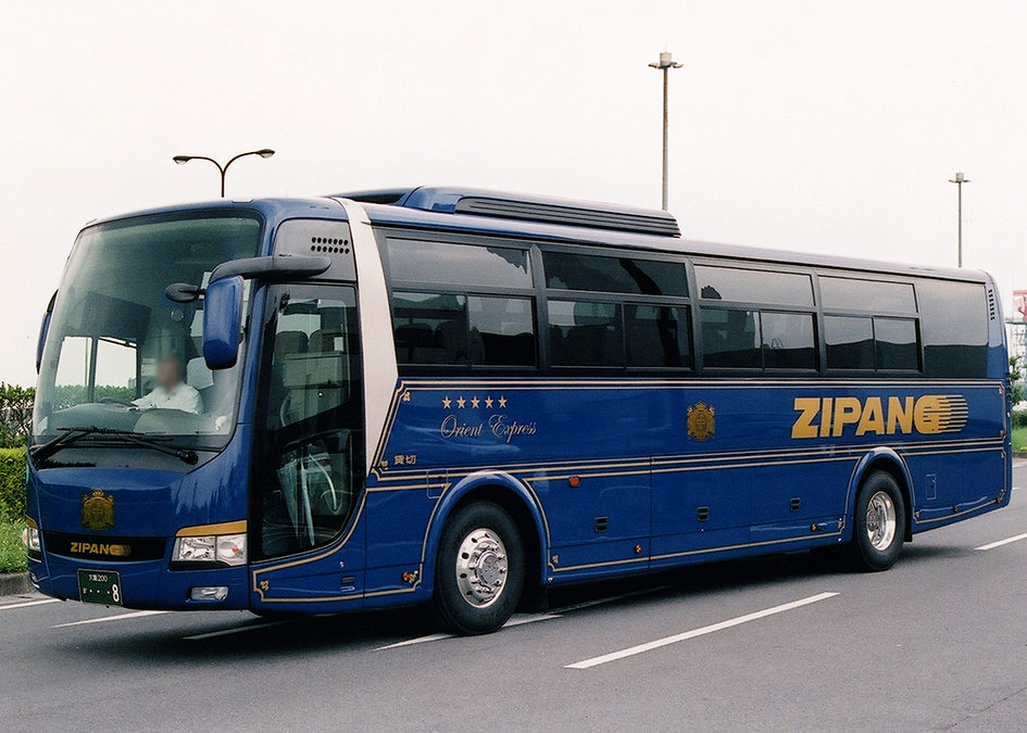 ジパング オリエントエクスプレス 日産ディーゼル・スペースアローA BKG-AS96JP